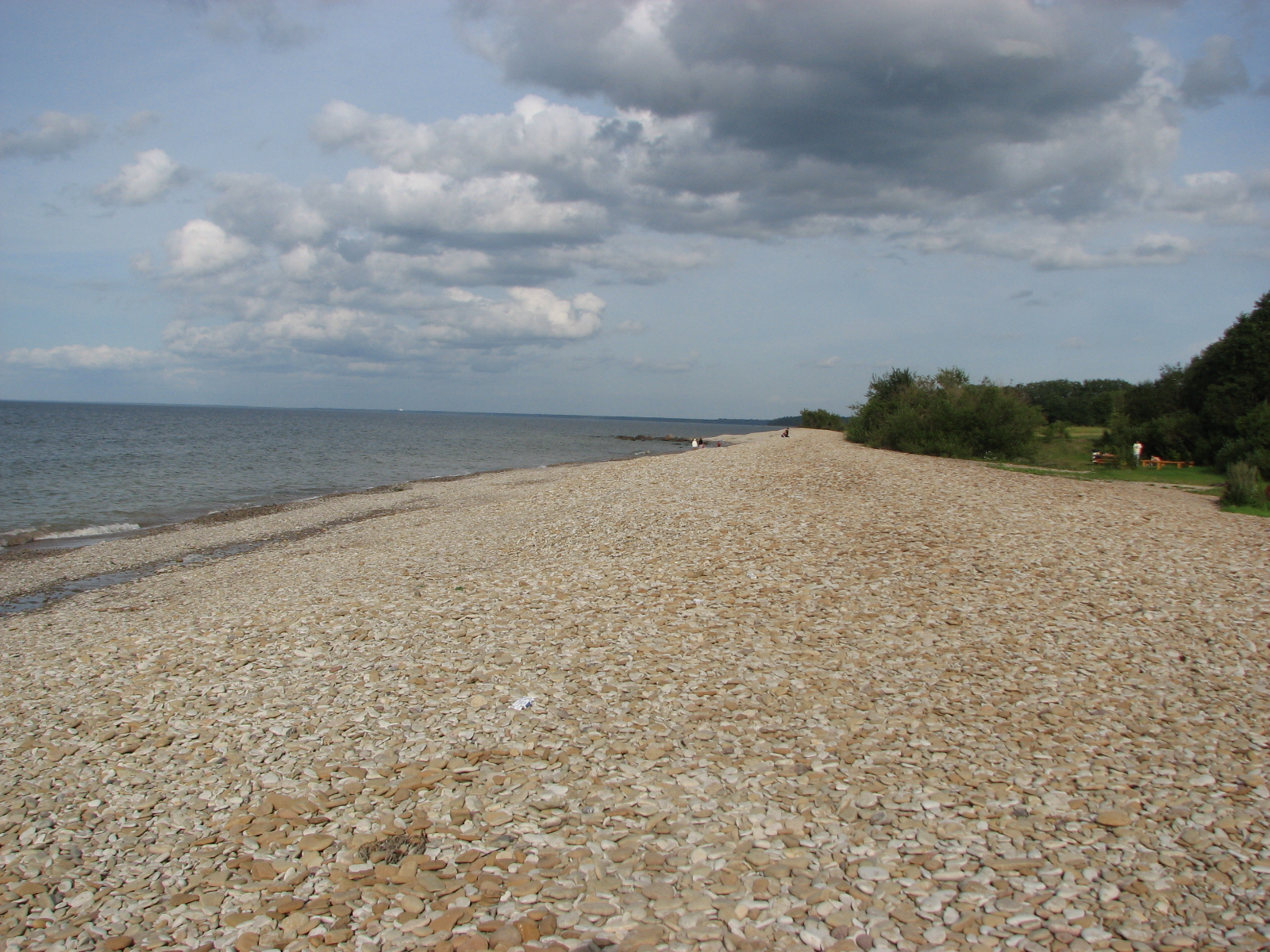 Sillamäe beach. Sillamäe, Estonia